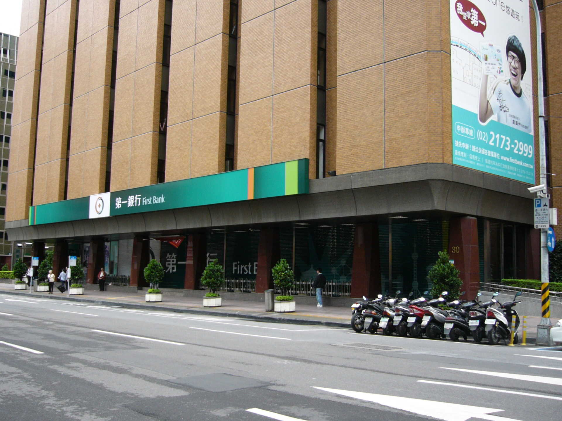 第一商業銀行總行，位於第一金控總部大樓1樓。